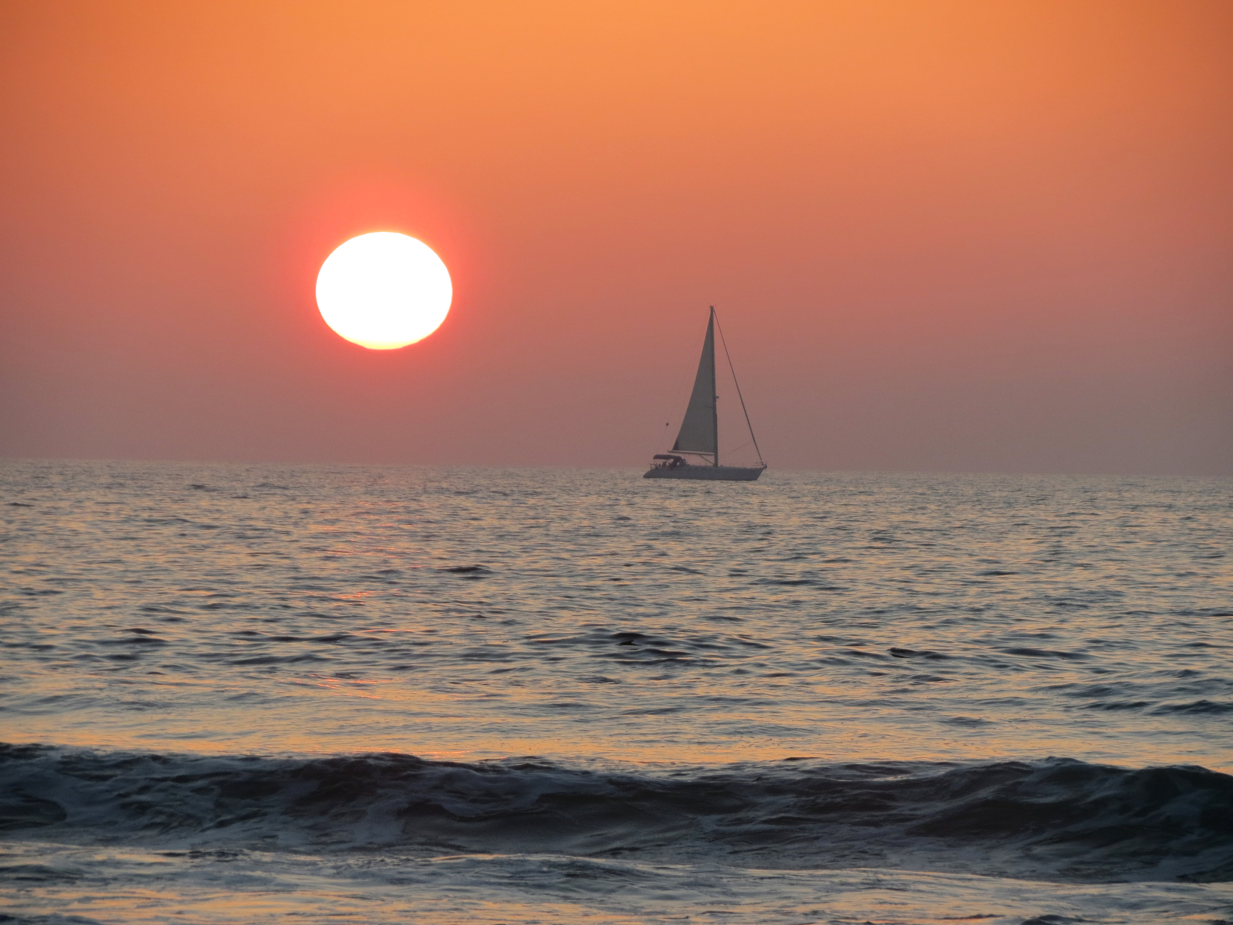 שקיעה בים תיכון אלרז כהן תיכון רוטברג